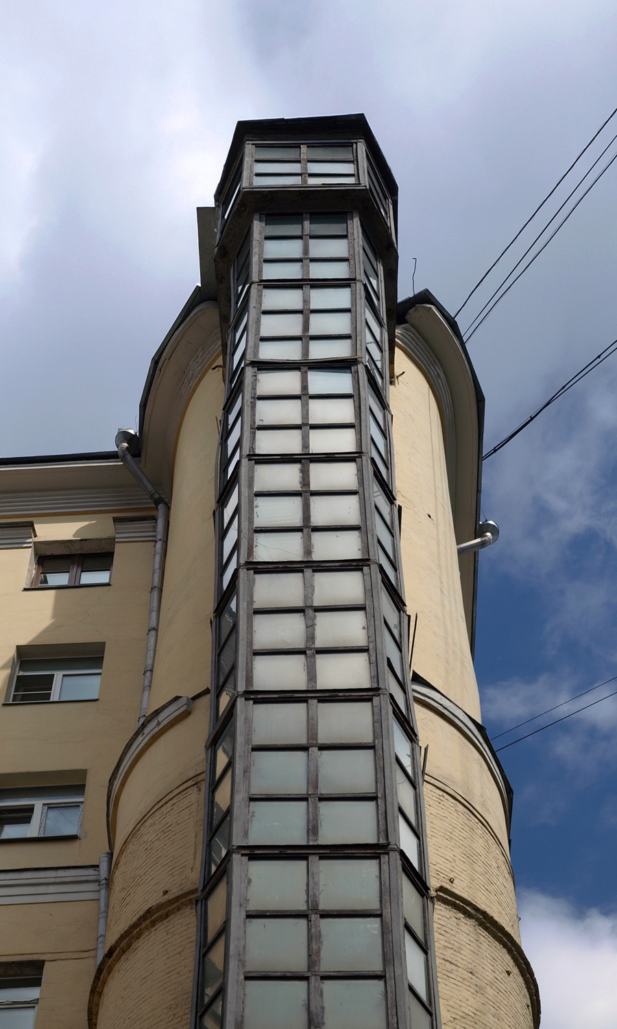 Trubnikovsky Lane, Moscow - 100 year old elevator.